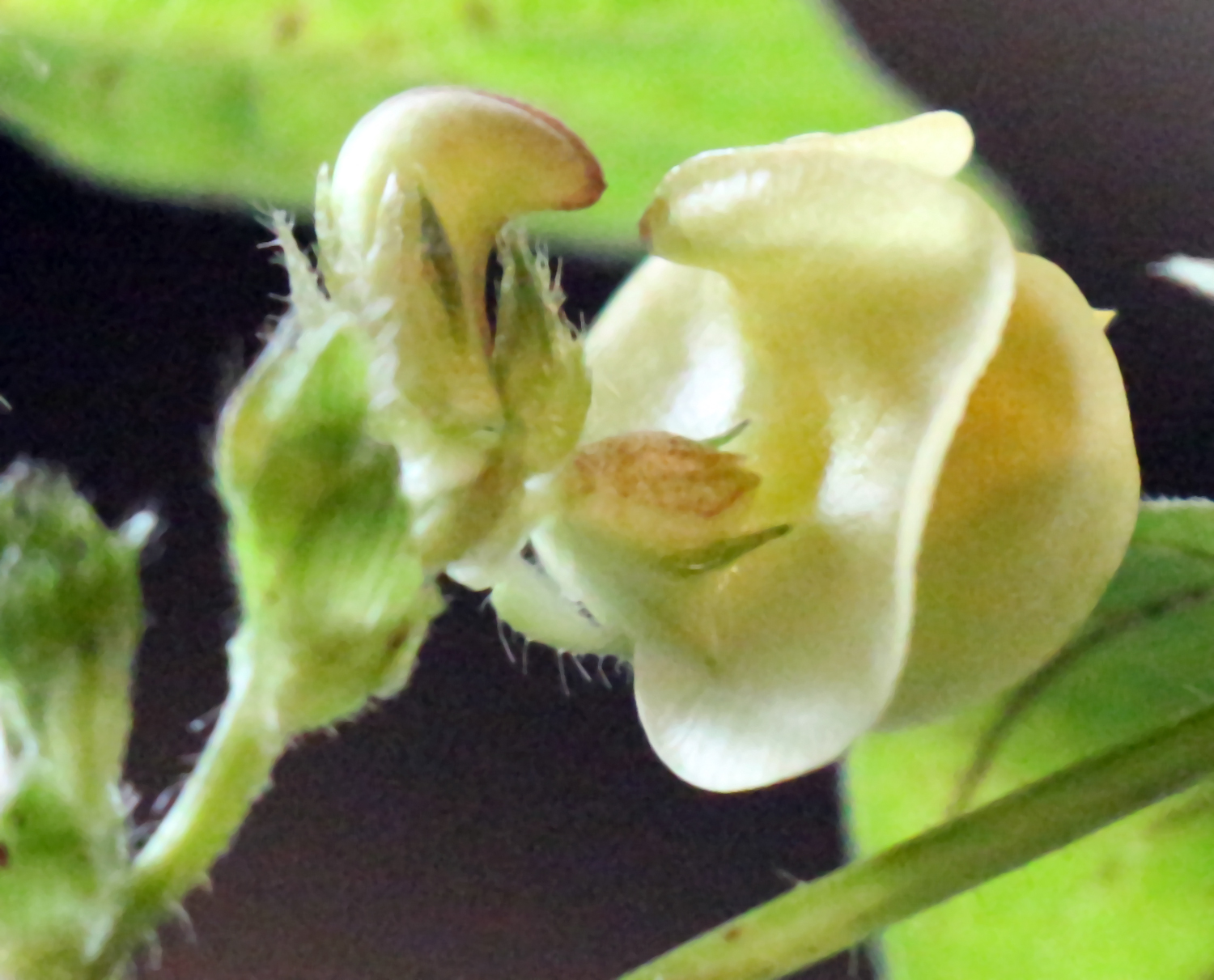 Nahaufnahme der Blüte, seitlich